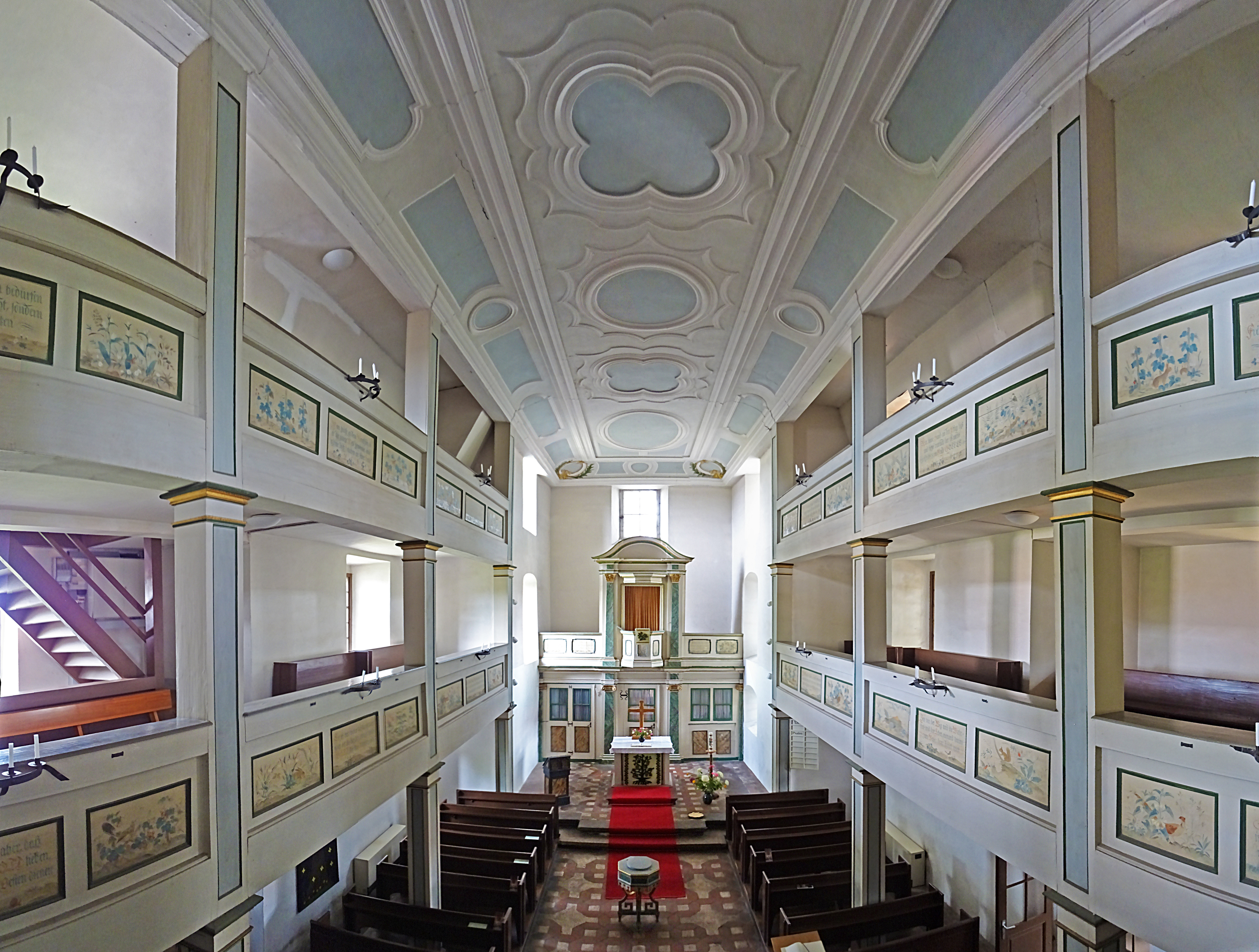 Innenansicht Dorfkirche Winzerla